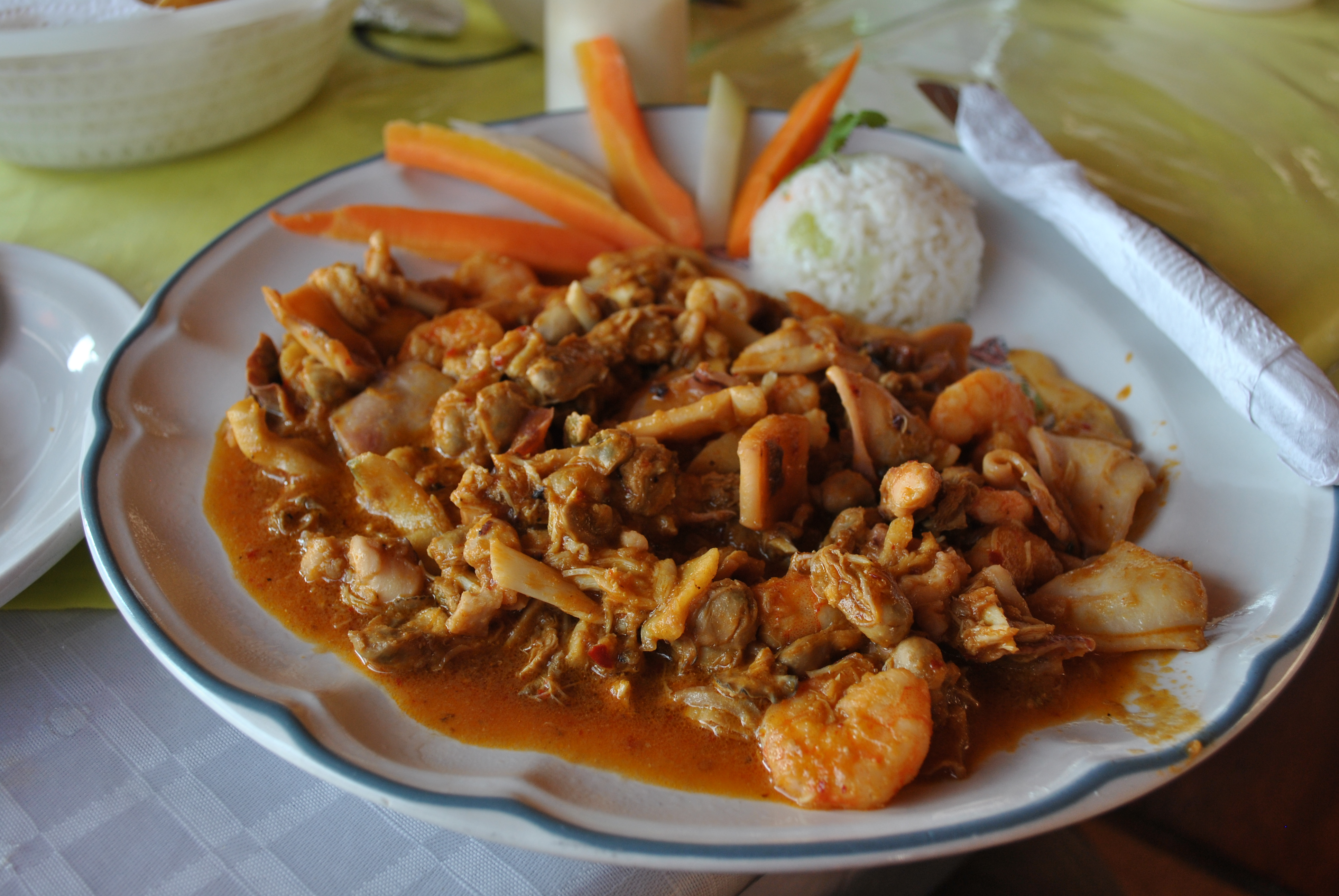 Mariscos en salsa de chile chiltepín, Tabasco, México.